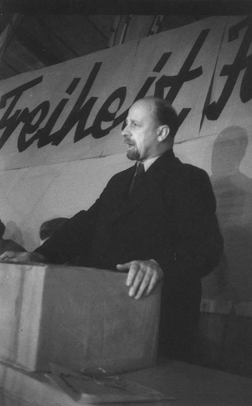 Berlin, Walter Ulbricht am Rednerpult Zentralbild Großveranstaltung der Sozialistischen Einheitspartei Deutschland am 13.10.1946 im Zirkus Barlay in Berlin. UBz: Der Generalsekretär der SED Walter Ulbricht bei seiner Rede. Abgebildete Personen: Ulbricht, Walter: Staatsratsvorsitzender, Erster Sekretär des Zentralkomitees (ZK) der SED, Vorsitzender des Nationalen Verteidigungsrates, DDR (GND 118625179)